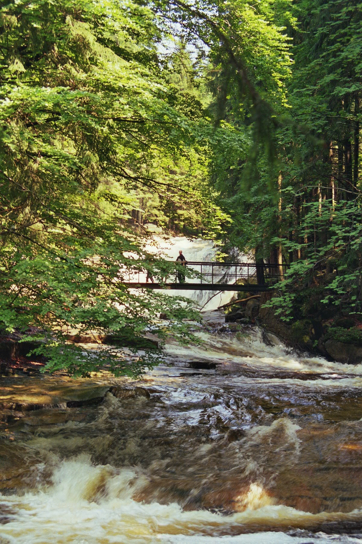 Mummelfall im Juli 2005. 24x36 (Kleinbildfilm)